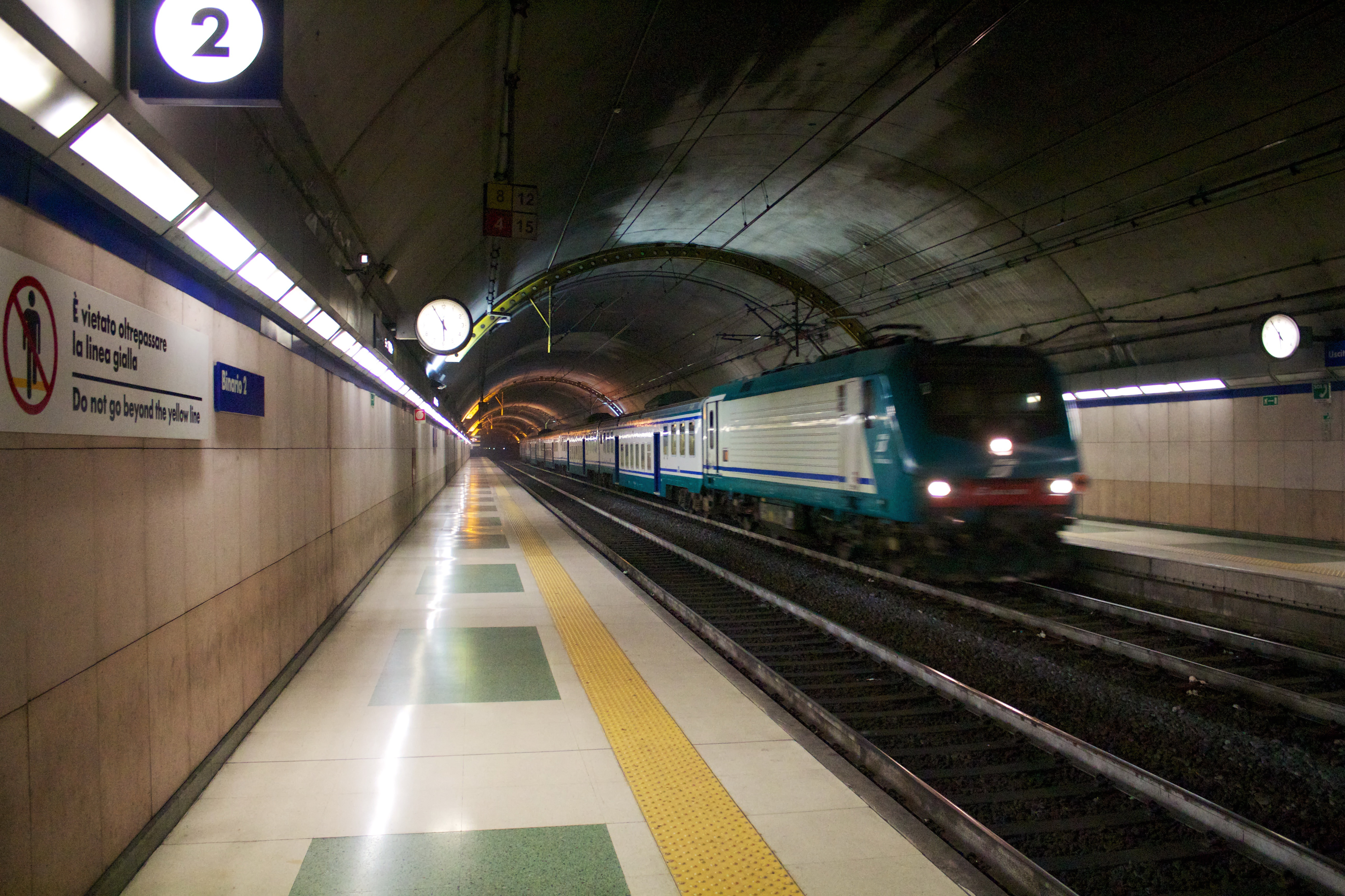 Treno in arrivo presso la stazione di Sanremo